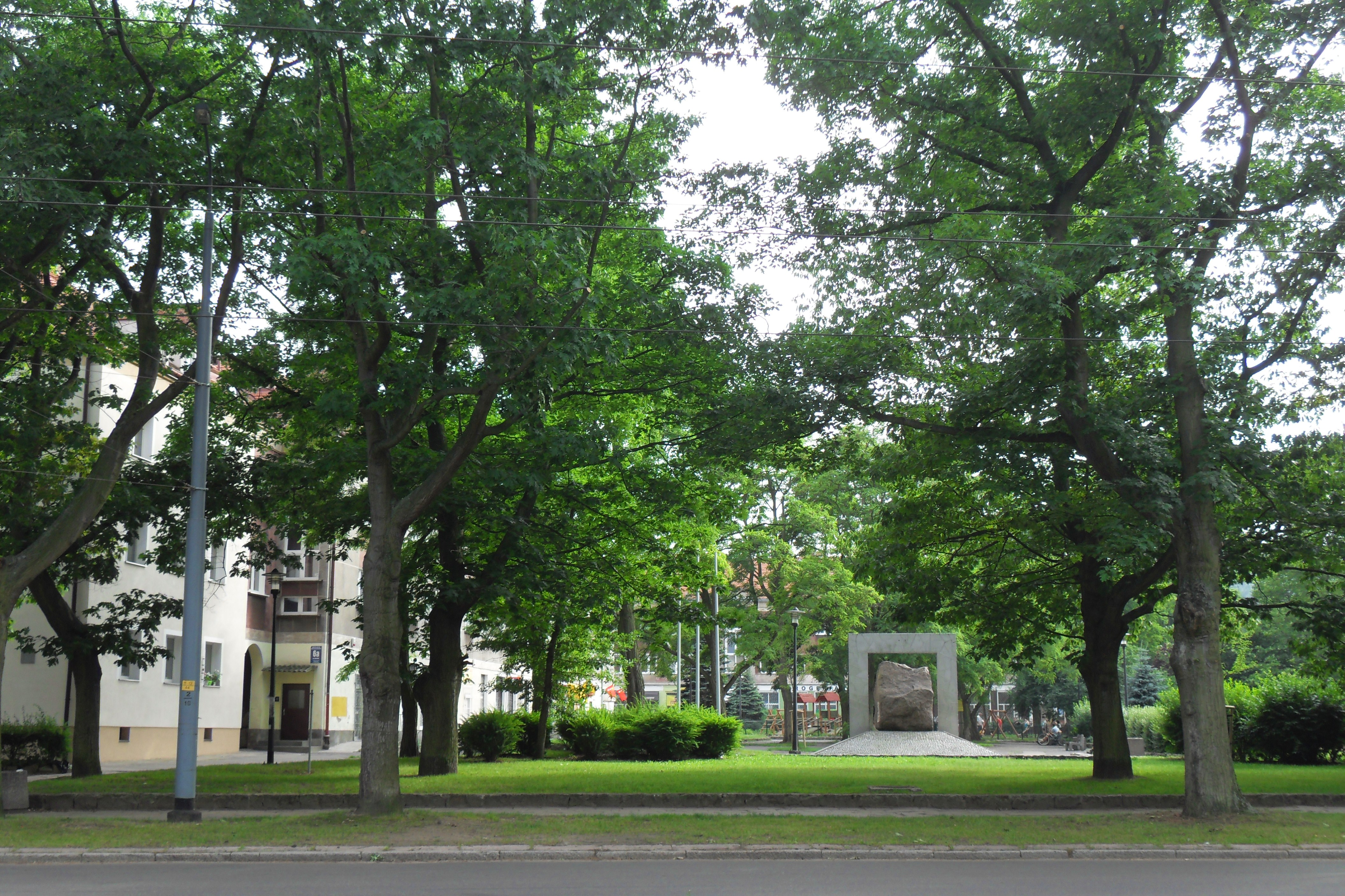 Gdańsk Strzyża, plac generała Stanisława Maczka.